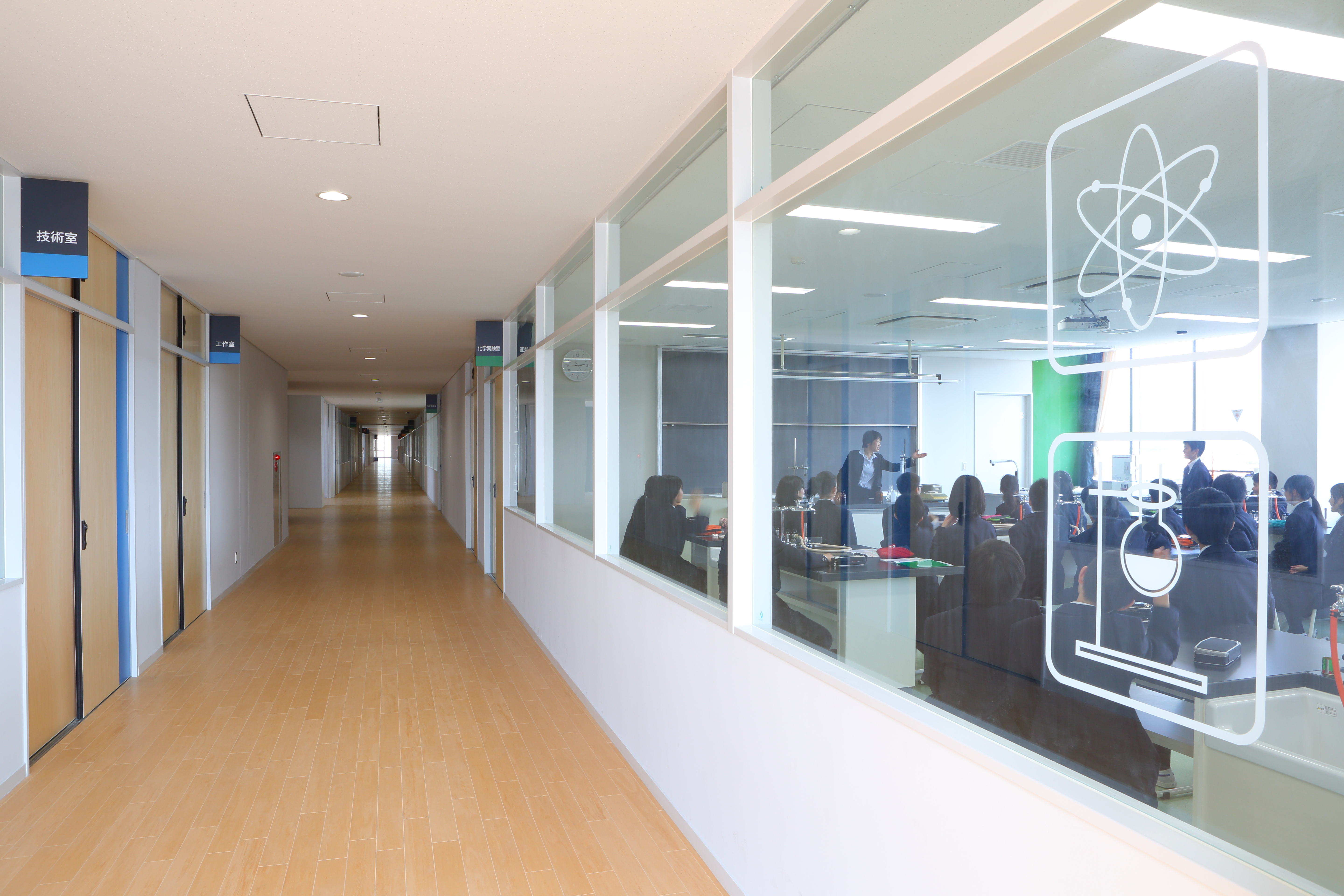 50周年記念校舎の教室